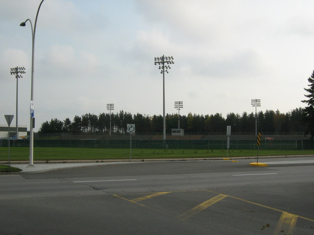 Stade de l'UQTR à Canada